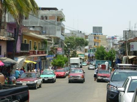 zelfgemaakte foto, 8 mei 2007: Straatbeeld, Santiago Pinotepa Nacional